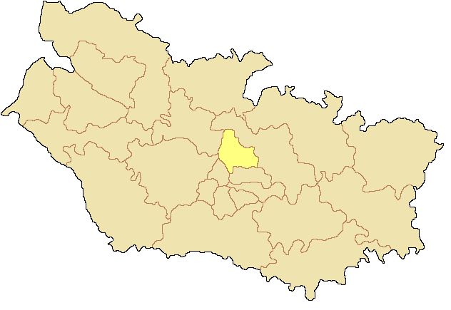 Canton d'Amiens-2 dans le département de la Somme